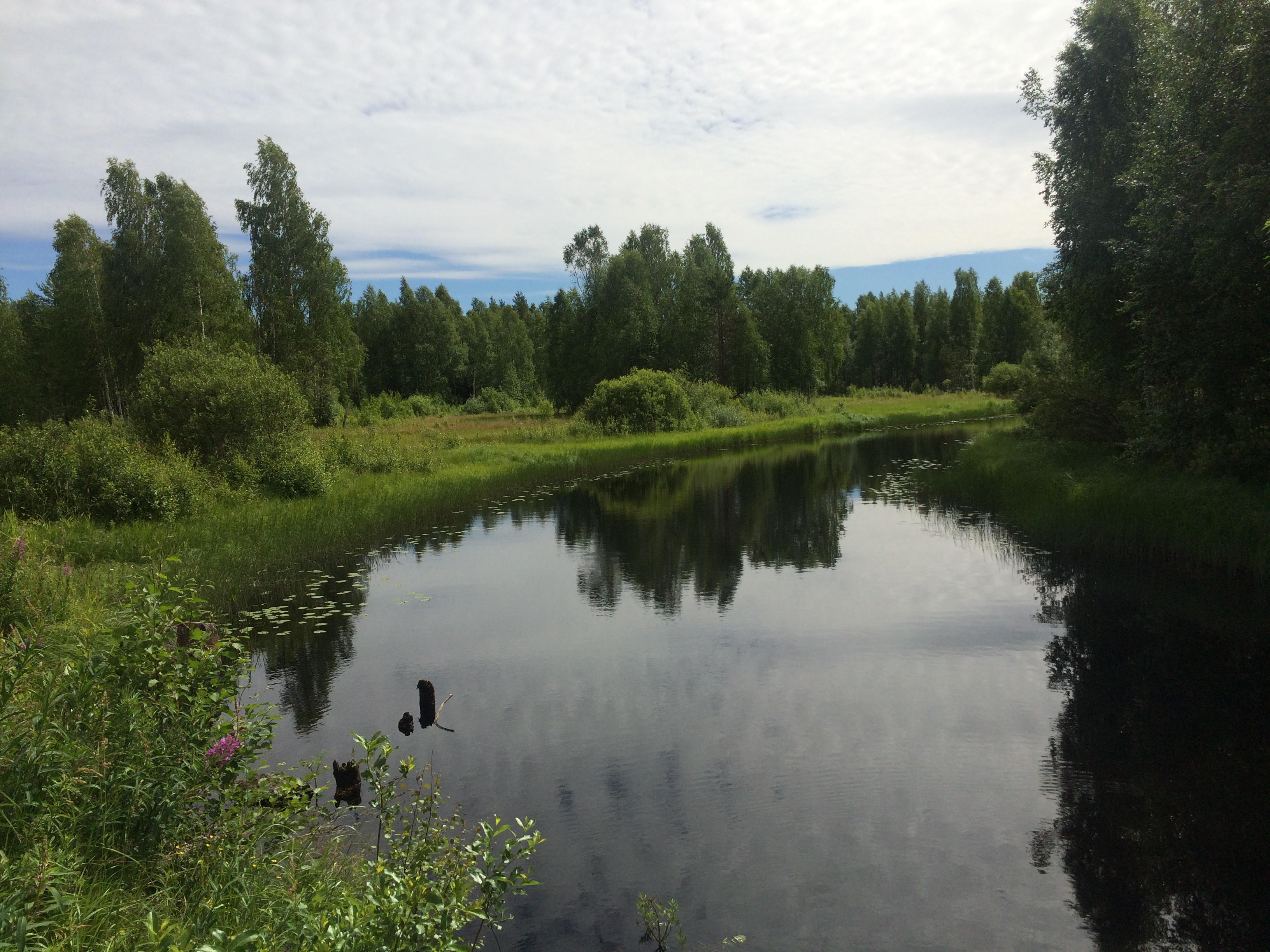 Соанйоки